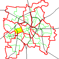 Die Lage des Leipziger Stadtteils Lindenau. Die Ausdehnung des historisch gewachsenen Lindenaus (gelb) deckt sich nicht mit den administrativ neu festgelegten Stadt- u. Ortsteilen (rote bzw. grüne Grenzlinien).